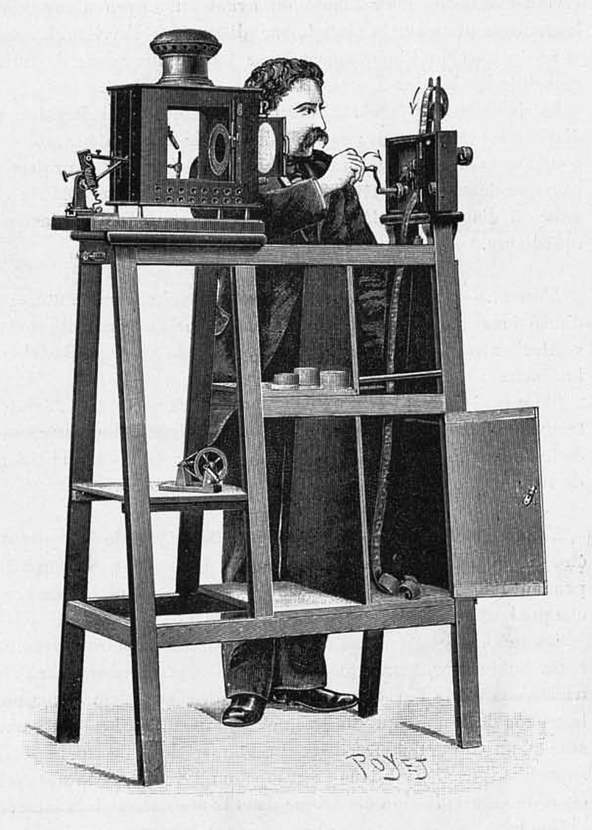 Cinematographe Camera mode filmation